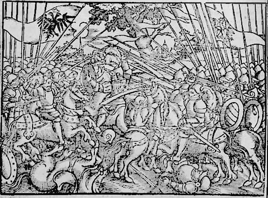 Bitwa na Psim Polu / Battle at Psie Pole 1109